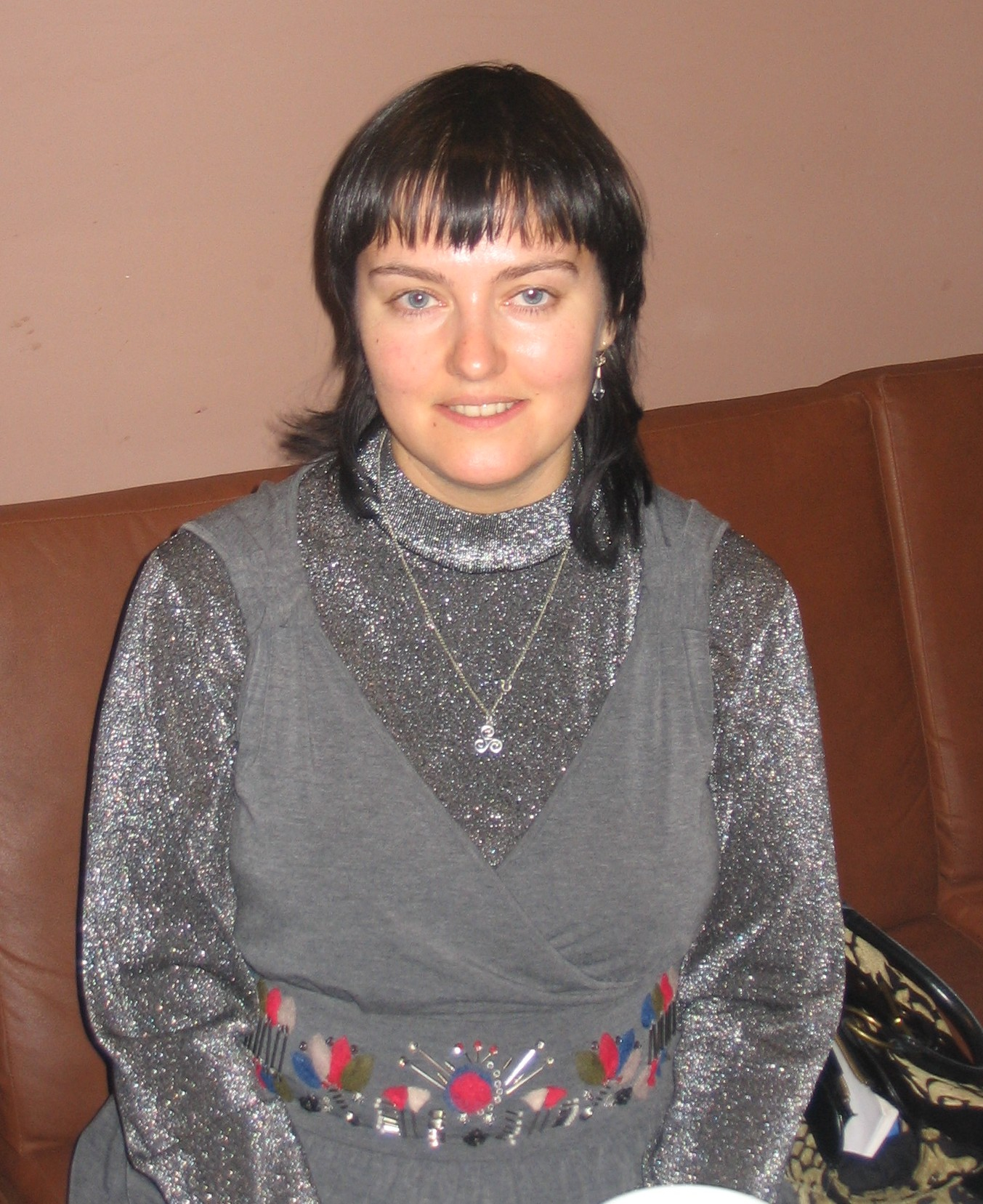 Anna Mouradova, écrivain et linguiste russe. Le 6 avril 2007, café "La belle Chocolatière", Moscou, par Dmitri V. Sitchinava (=User:Mitrius)